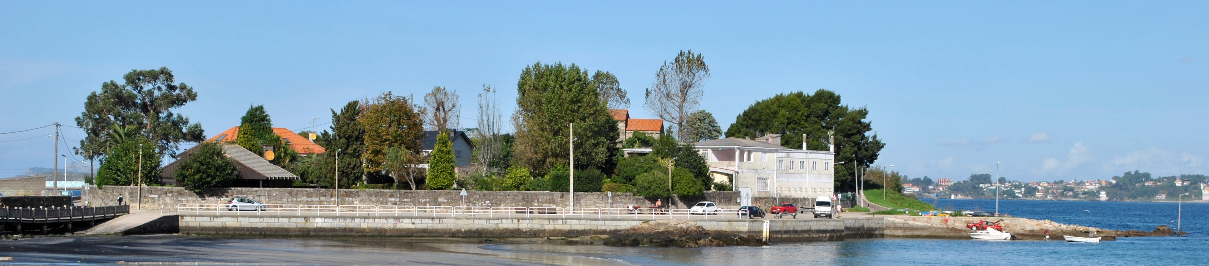 Véxase o título e as categorías.